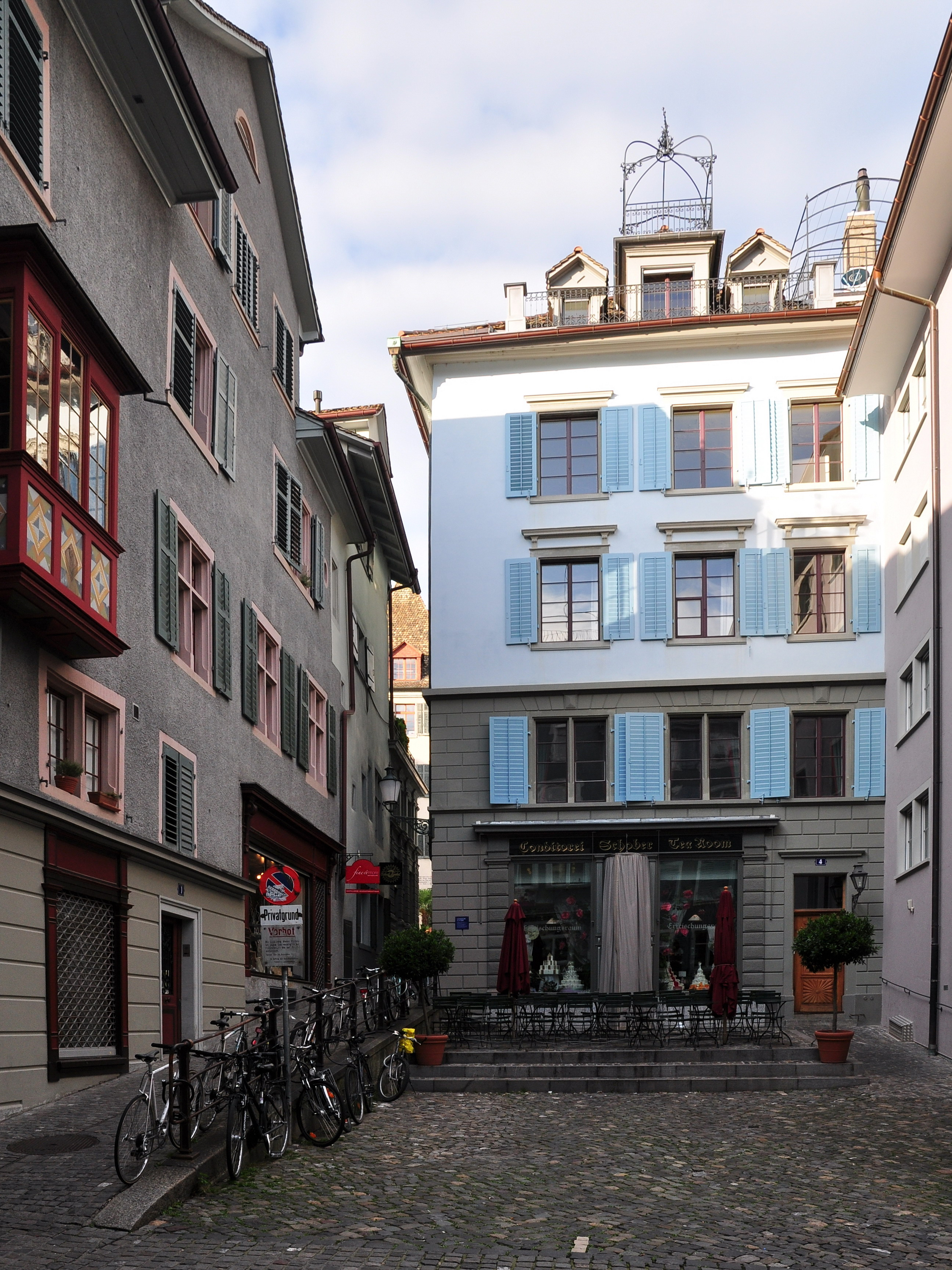 Schober, Zürich-Niederdorf (Switzerland)